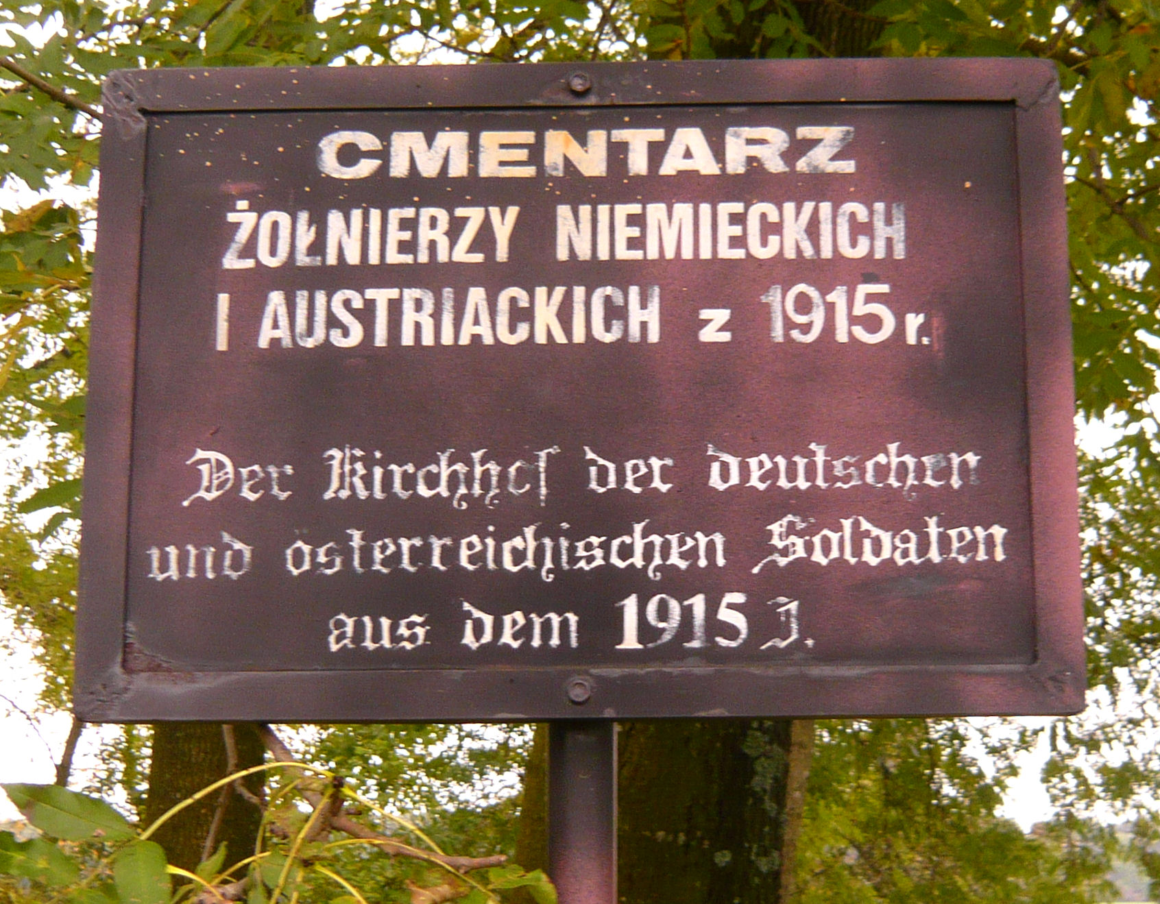 Cmentarz wojenny z I wojny światowej Kiełczewice Dolne, woj. lubelskie